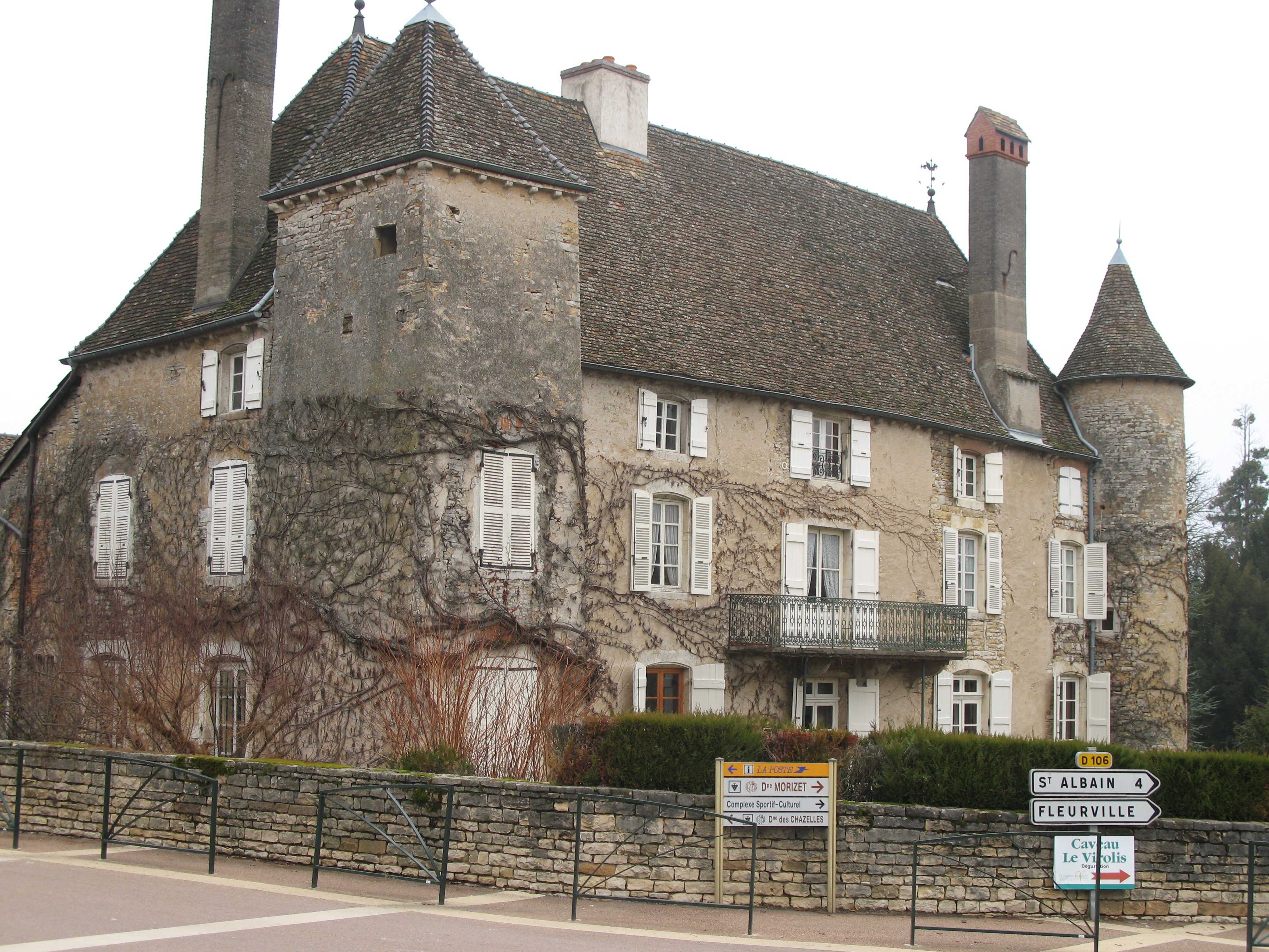 château de Châtillon - Viré (Saône-et-Loire)